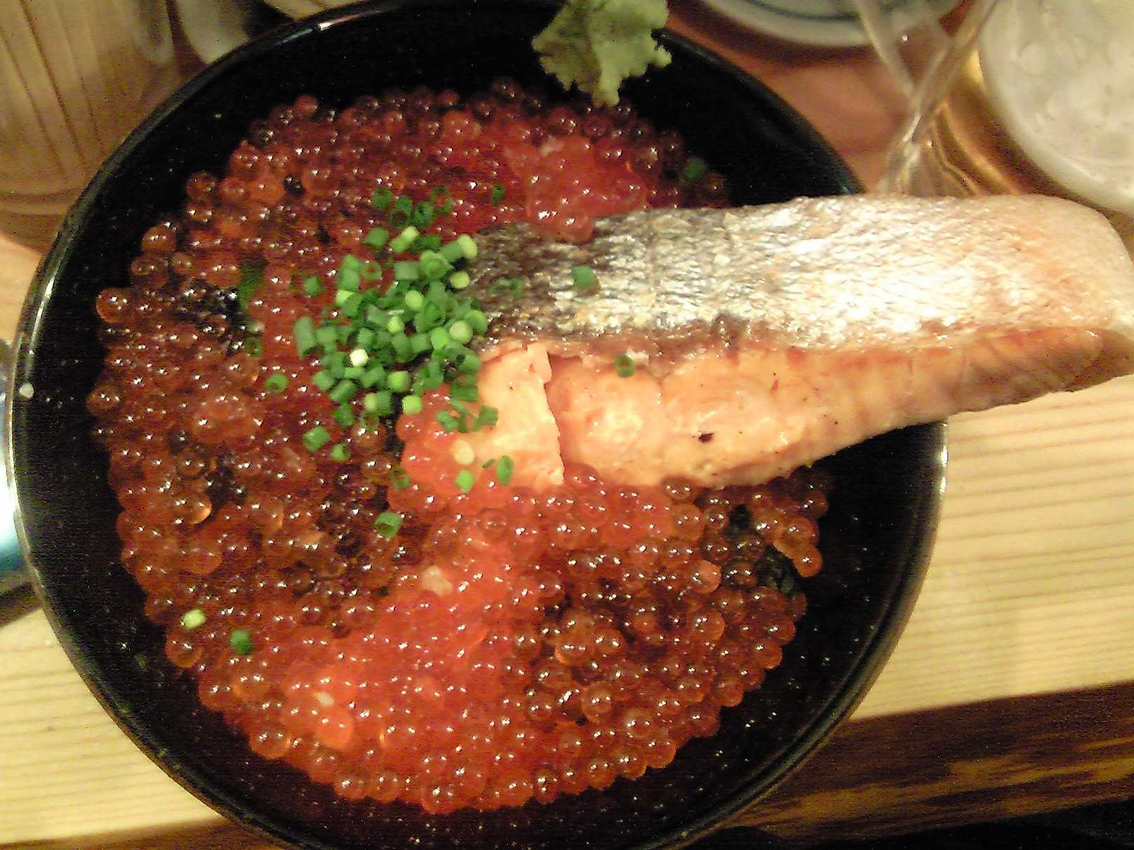 鮭といくらの親子丼